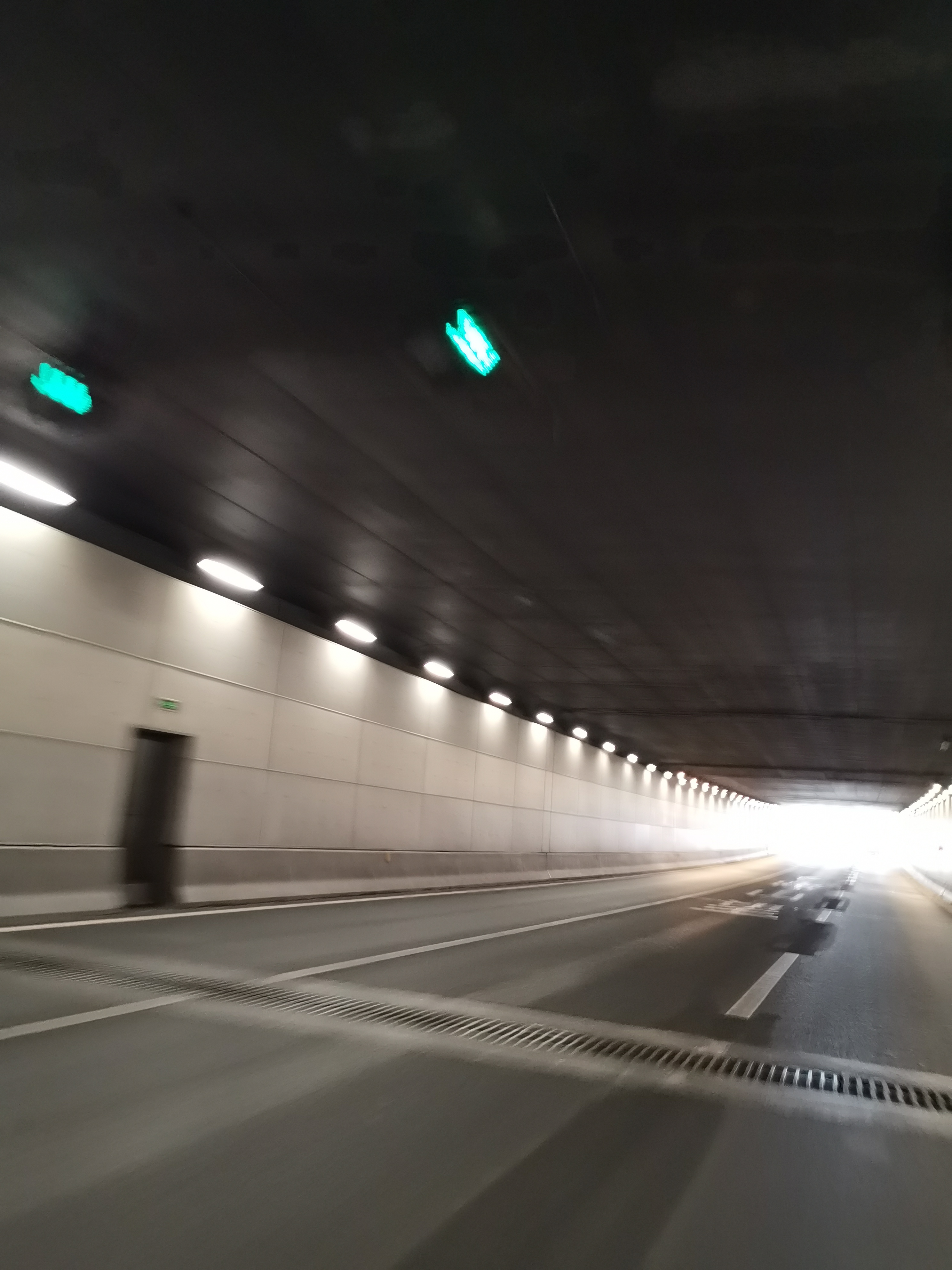 青祁隧道 2020-2